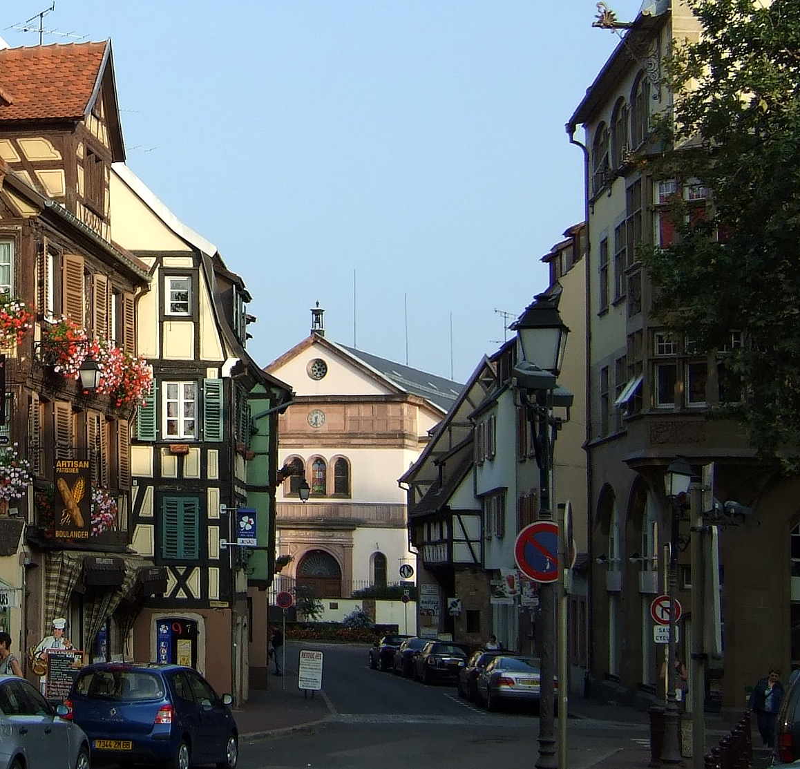 Colmar Synagogue is seen at the end of the street.